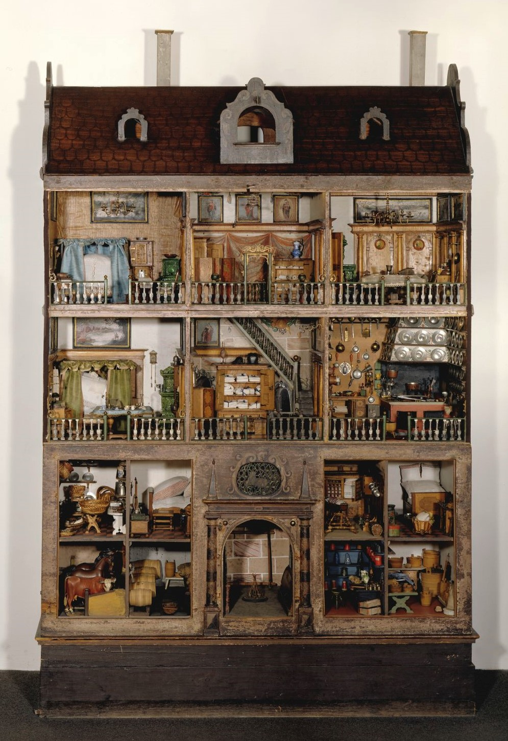 Datierung: 1639, Maße: H.: 259,0 cm, B.: 194,0 cm, T.: 58,7 cm, Ausstellungsort: Germanisches Nationalmuseum in Nürnberg Leihgabe der Tucher'schen Kulturstiftung